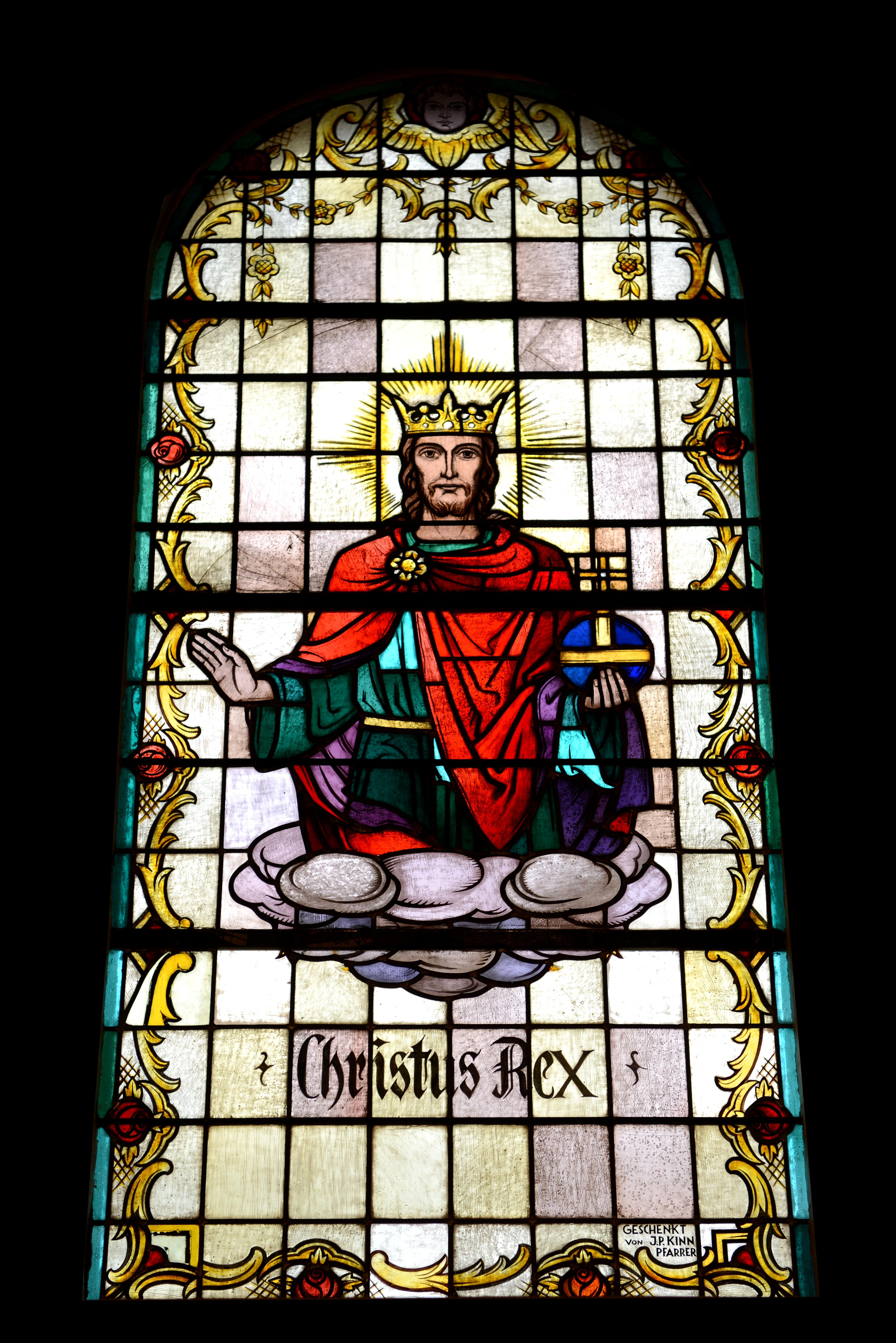 D'Christus-Rex-Fënster an der Kierch zu Beidler.